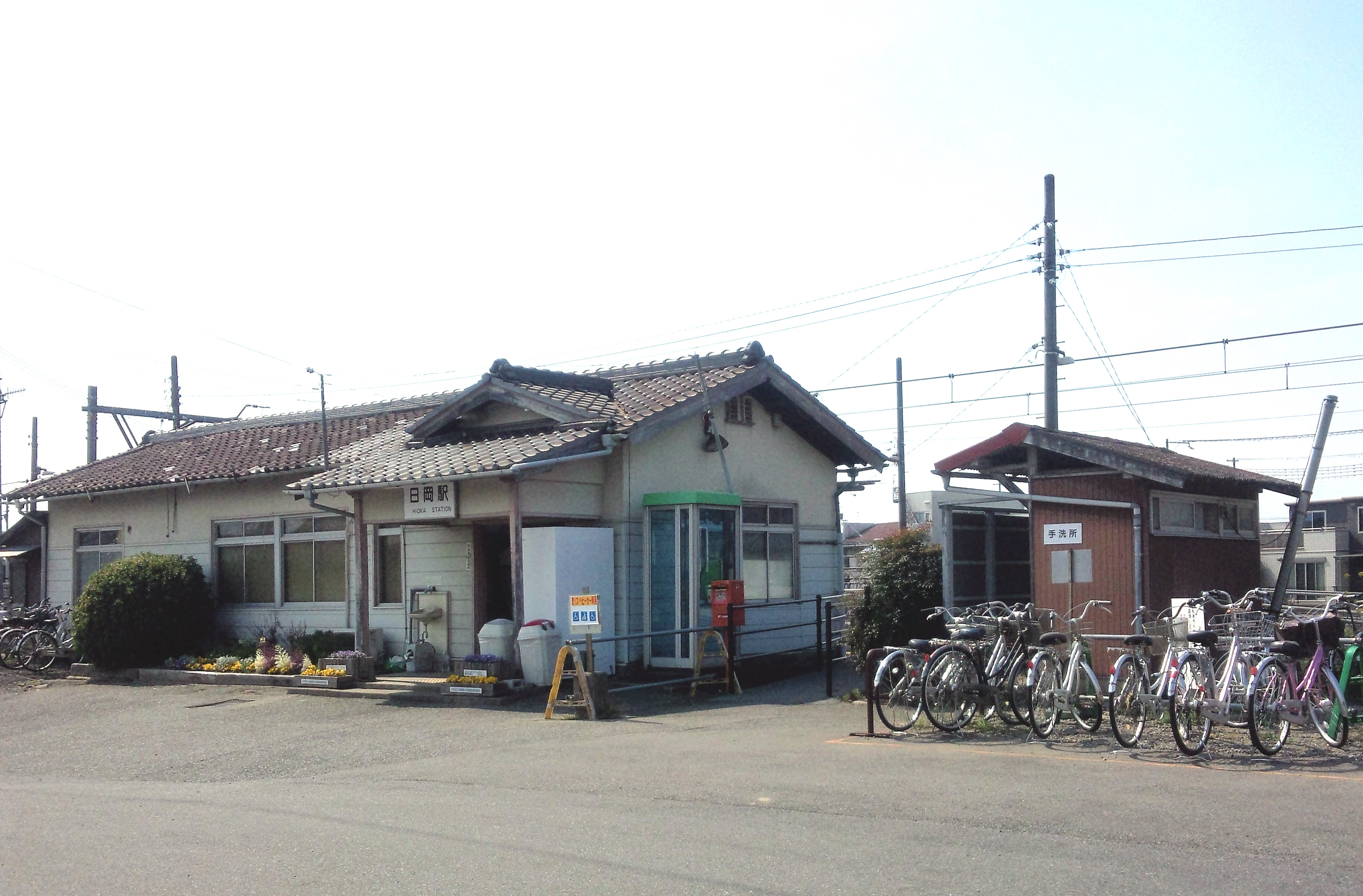 日岡駅駅舎2